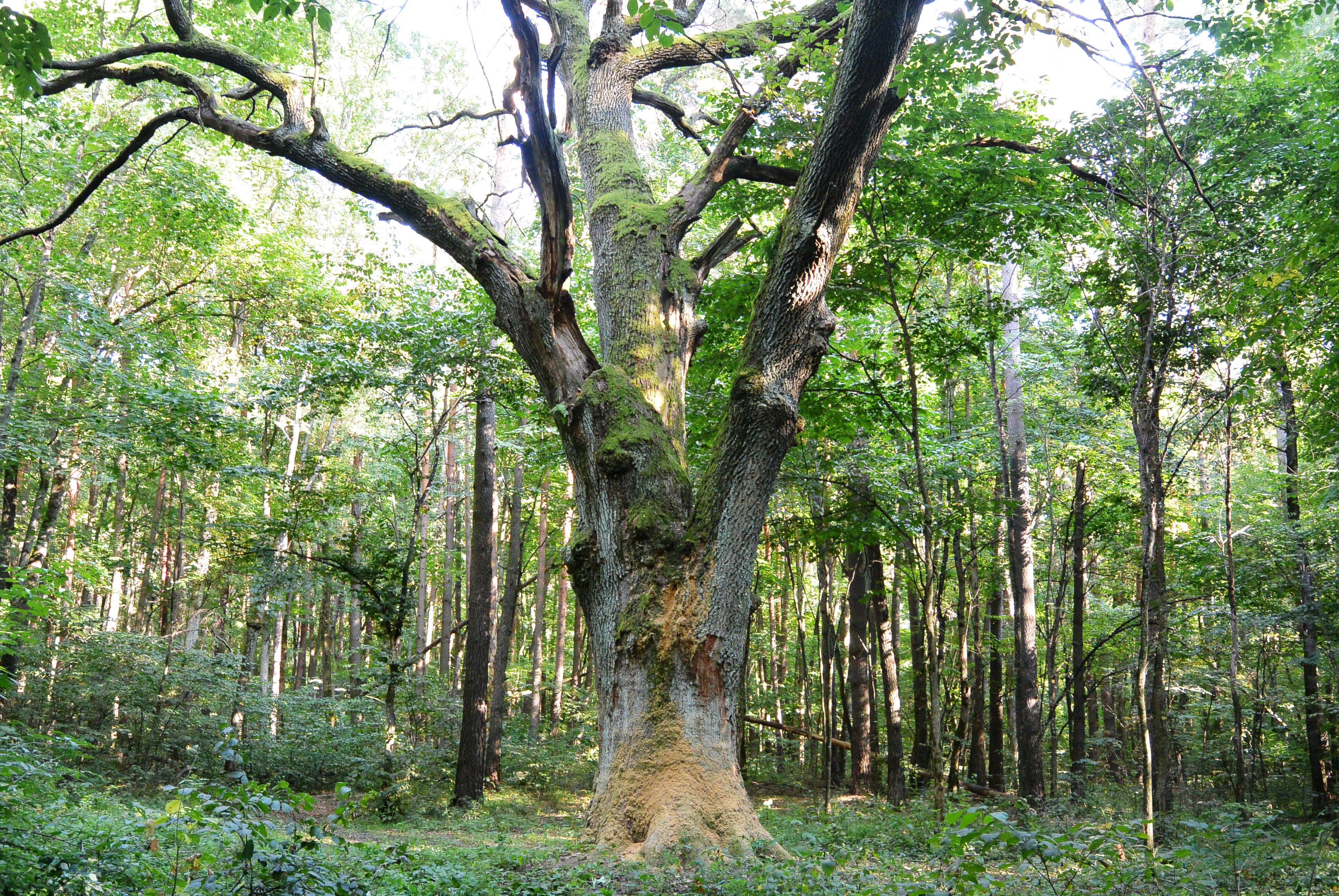 Дуб Орел - 500 років Кролевець